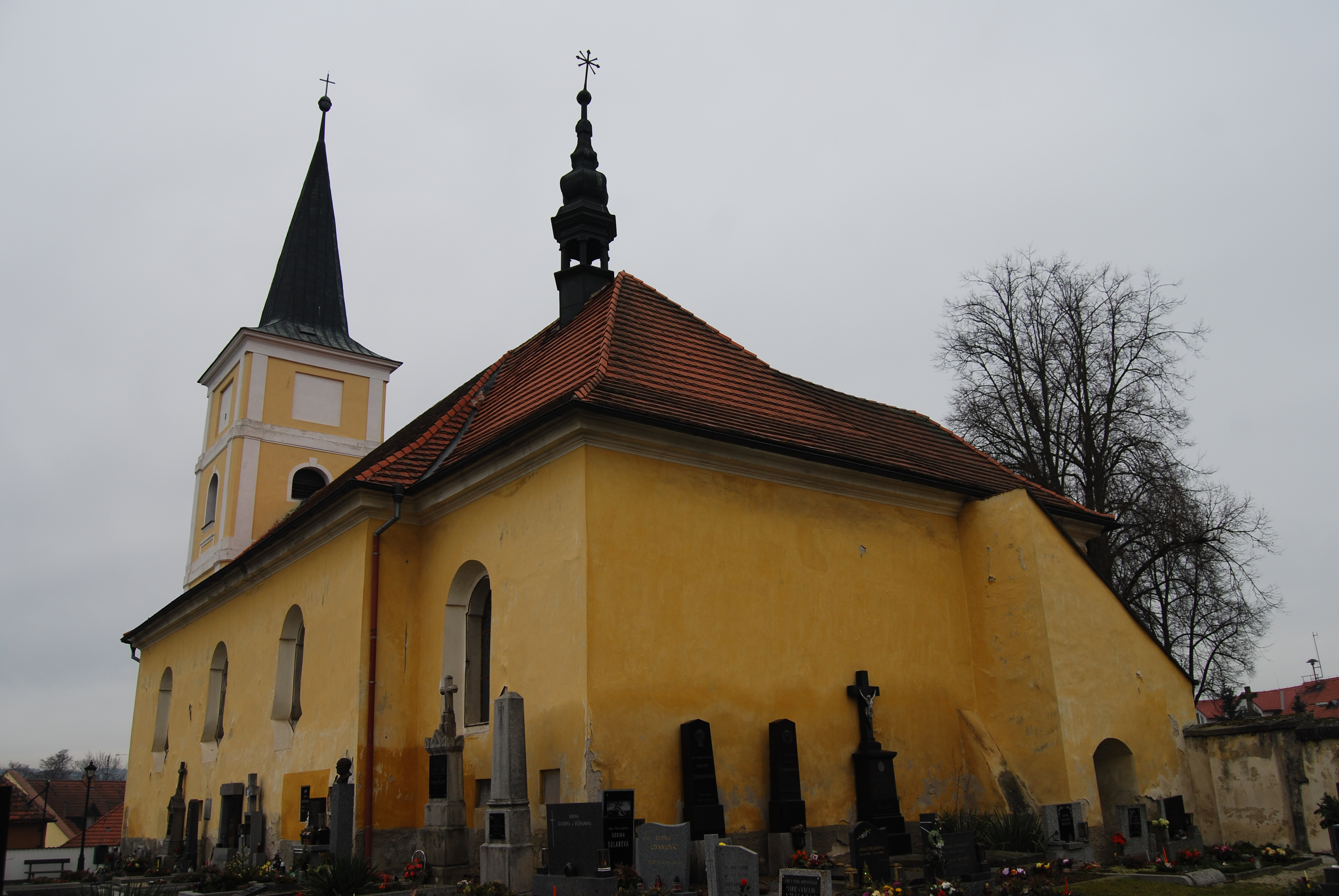 Kostel sv. Martina - pohled ze hřbitova. Střelské Hoštice v severozápadní části Jihočeského kraje, v okrese Strakonice. Česká republika. - Google Maps - Google Earth